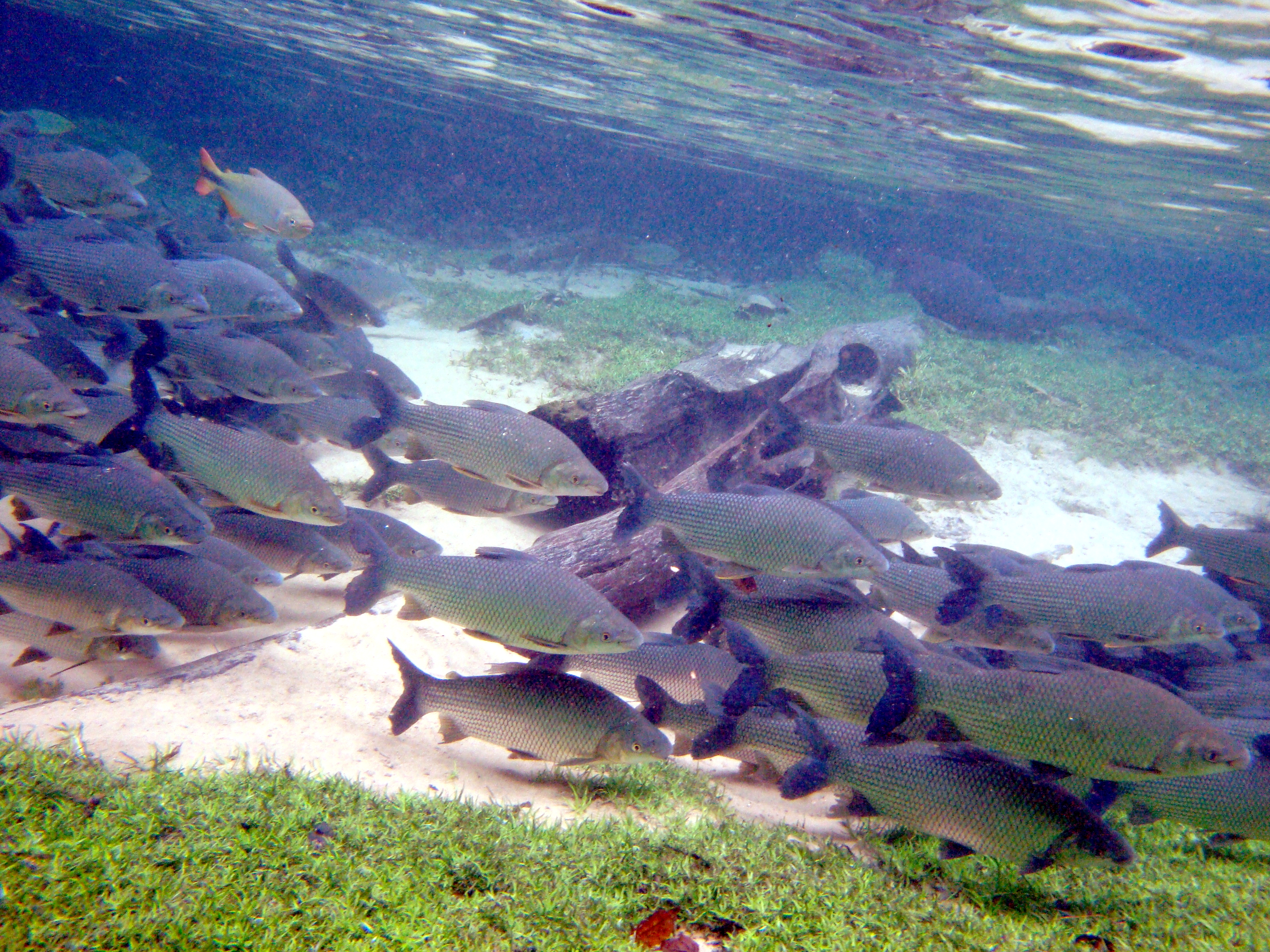 Foi possível capturar um cardume de peixes nativos ao fazer uma flutuação no Rio da Prata